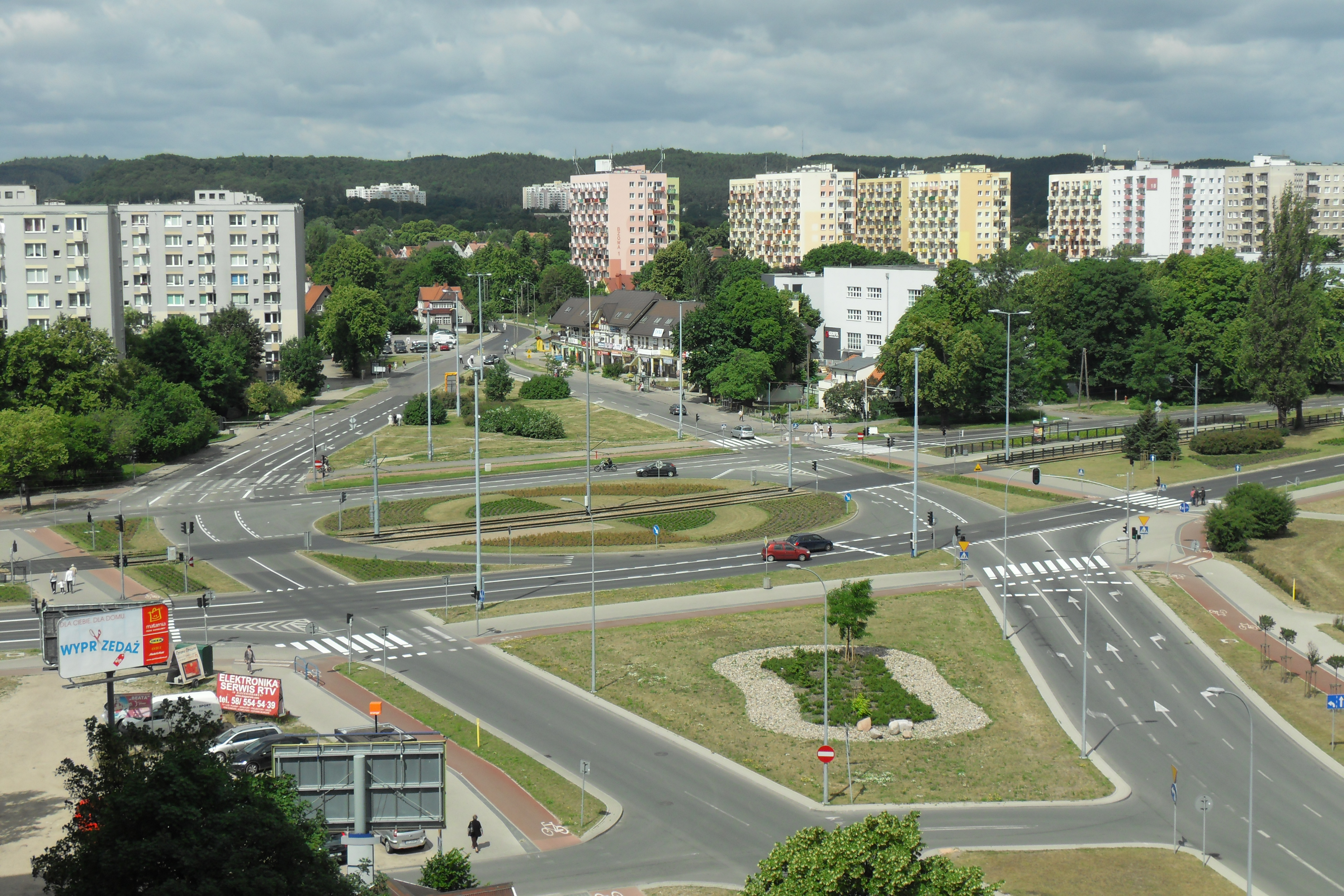 Gdańsk Przymorze. Ul. Chłopska, skrzyżowanie z ul. Obrońców Wybrzeża i Bora-Komorowskiego. W tle wieżowce przy ul. Bzowej.